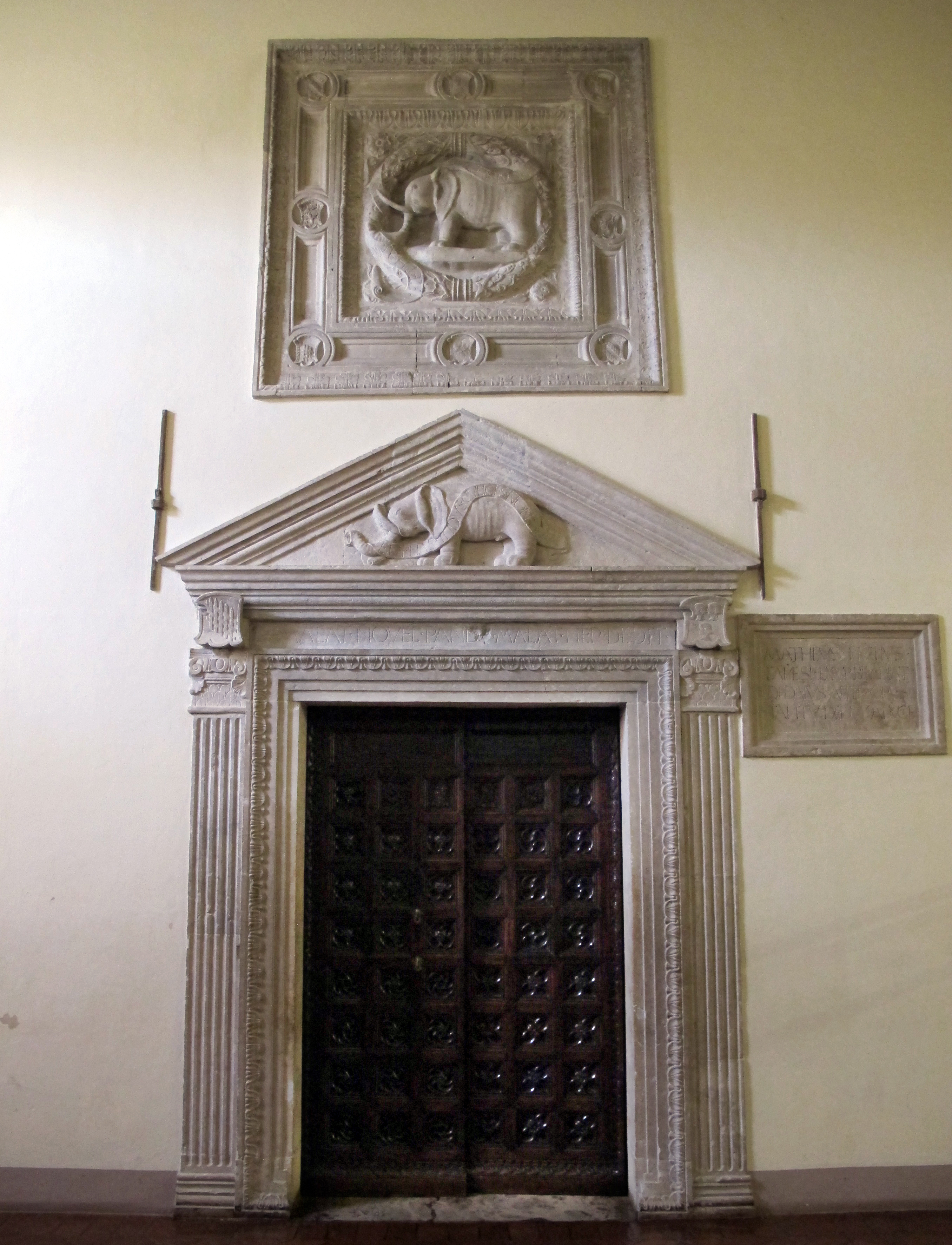 Biblioteca Malatestiana - MIBAC This is a photo of a monument which is part of cultural heritage of Italy.